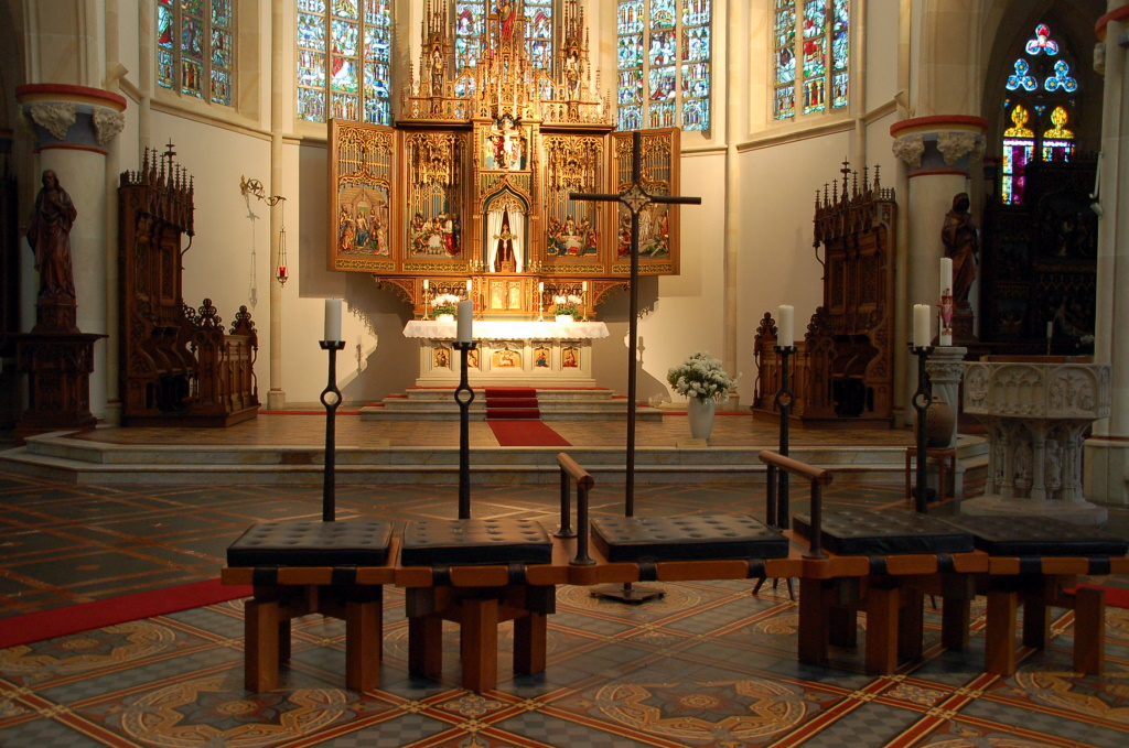 Hochaltar in der St. Idakirche in Herzfeld (Westf.)